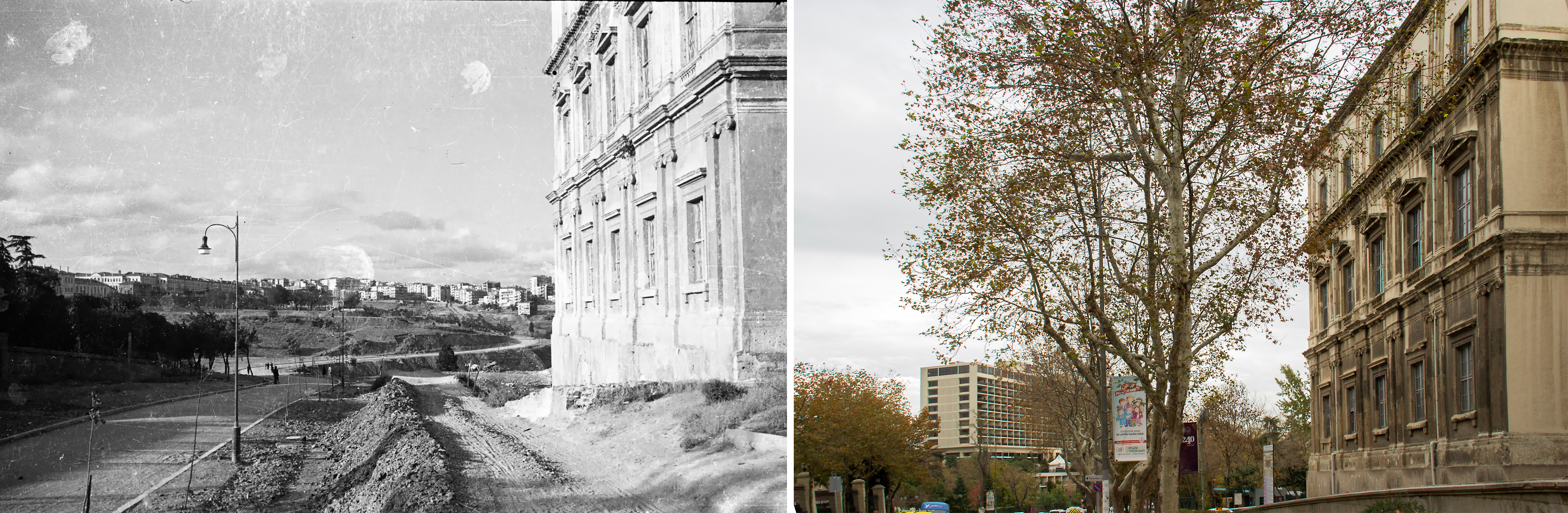 İstanbul Hilton, the first five star hotel in Turkey, opened in 1955. The building was designed by the American architecture office Skidmore, Owings & Merrill in 1952. The local consultant and the participating architect was Sedad Hakkı Eldem. Eldem was expected to incorporate vernacular elements to the design. With its entrance canopy resembling a flying carpet, the Hilton is considered to be one of the great examples of “International Style.” The hotel broke the flow of Park No. 2 by disconnecting Taksim Gezi Park from Maçka Park so undermining the zoning plan of Henri Prost. SALT Research, Söylemezoğlu Archive Türkiye ve İstanbul’un ilk beş yıldızlı oteli olan Hilton Oteli 1955’te açıldı. Otel 1952’de, Amerikan mimarlık ortaklığı Skidmore, Owings, Merill tarafından tasarlandı. Tasarım ve yapım sürecinde Sedad Hakkı Eldem yerel danışman ve katılımcı mimar olarak görev aldı. Eldem’den, “Enternasyonal Üslup”un en önemli örneklerinden biri olarak kabul edilen otelin tasarımına yerel unsurlar katması beklenmekteydi. Girişte yer alan ve uçan halı simgesini çağrıştıran dalgalı saçak buna bir örnektir. 1930’ların sonunda Henri Prost’a yaptırılan İstanbul nazım planı dâhilinde bulunan ve Taksim Gezi Parkı ile Maçka Demokrasi Parkı arasında uzanan 2 no’lu park alanının sürekliliği otelin inşaatı ile koptu, park ikiye bölündü. SALT Araştırma, Söylemezoğlu Arşivi